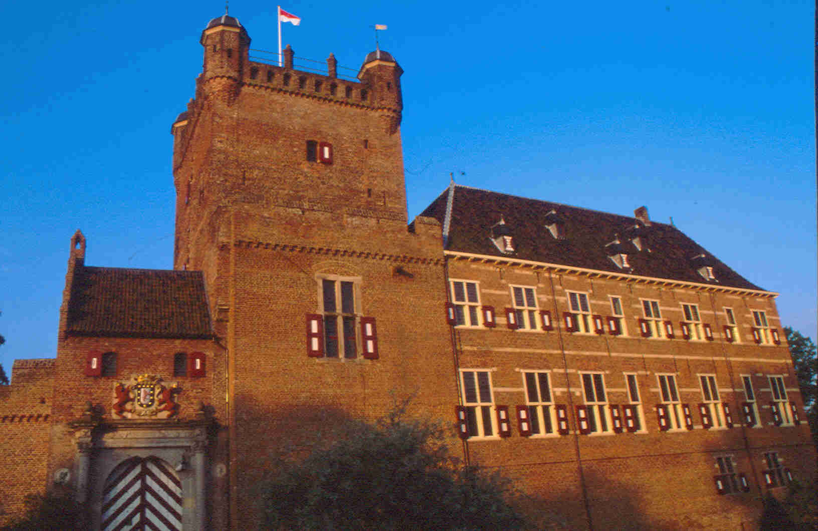 eigen werk 2002